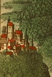 Burg Monterberg auf einem Ausschnitt aus der Stadtansicht von Kalkar aus Braun und Hogenbergs Civitates Orbis Terrarum, Band 2